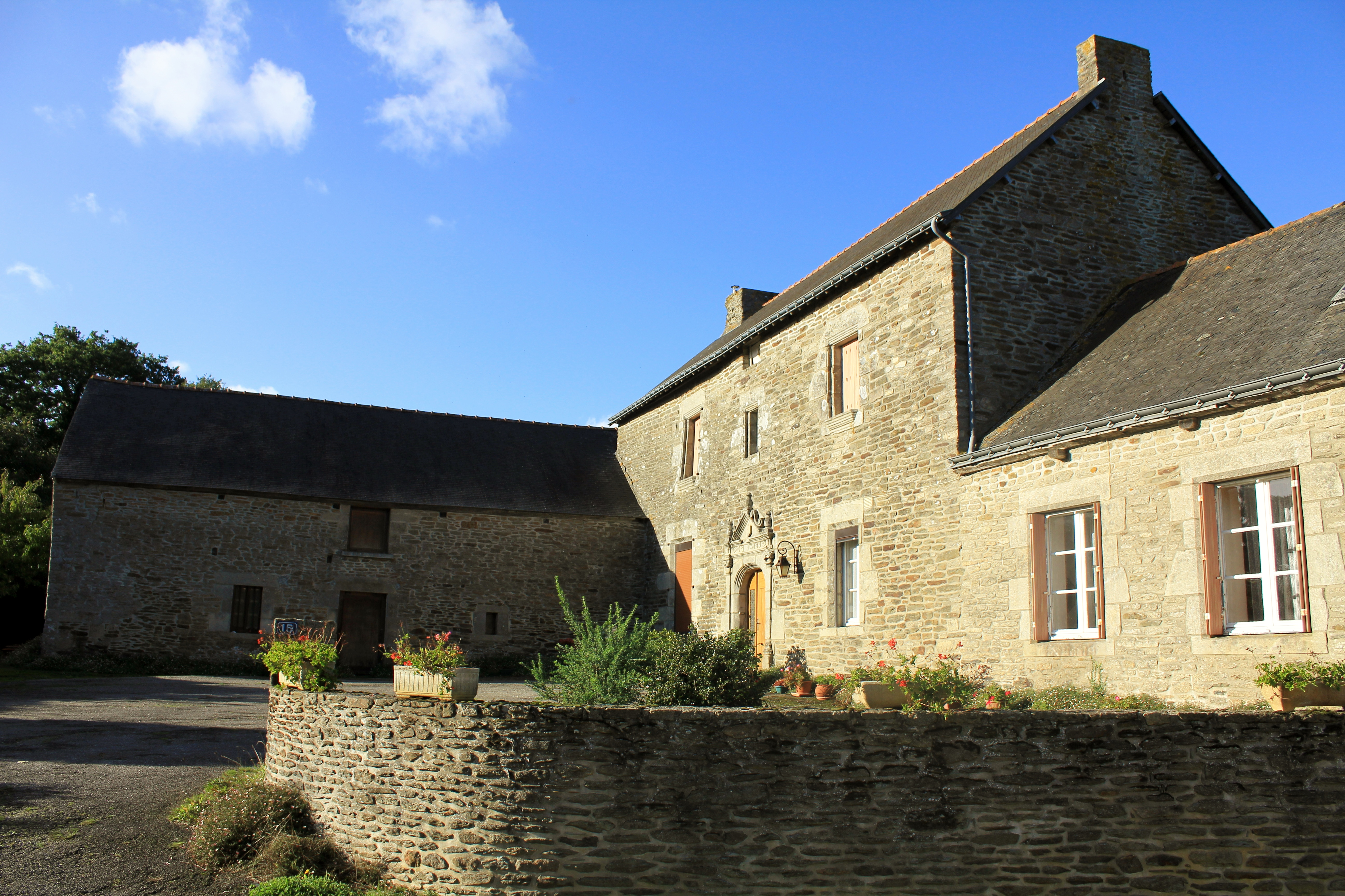 Maison, 9-15 Rue du Manoir (Lantillac)